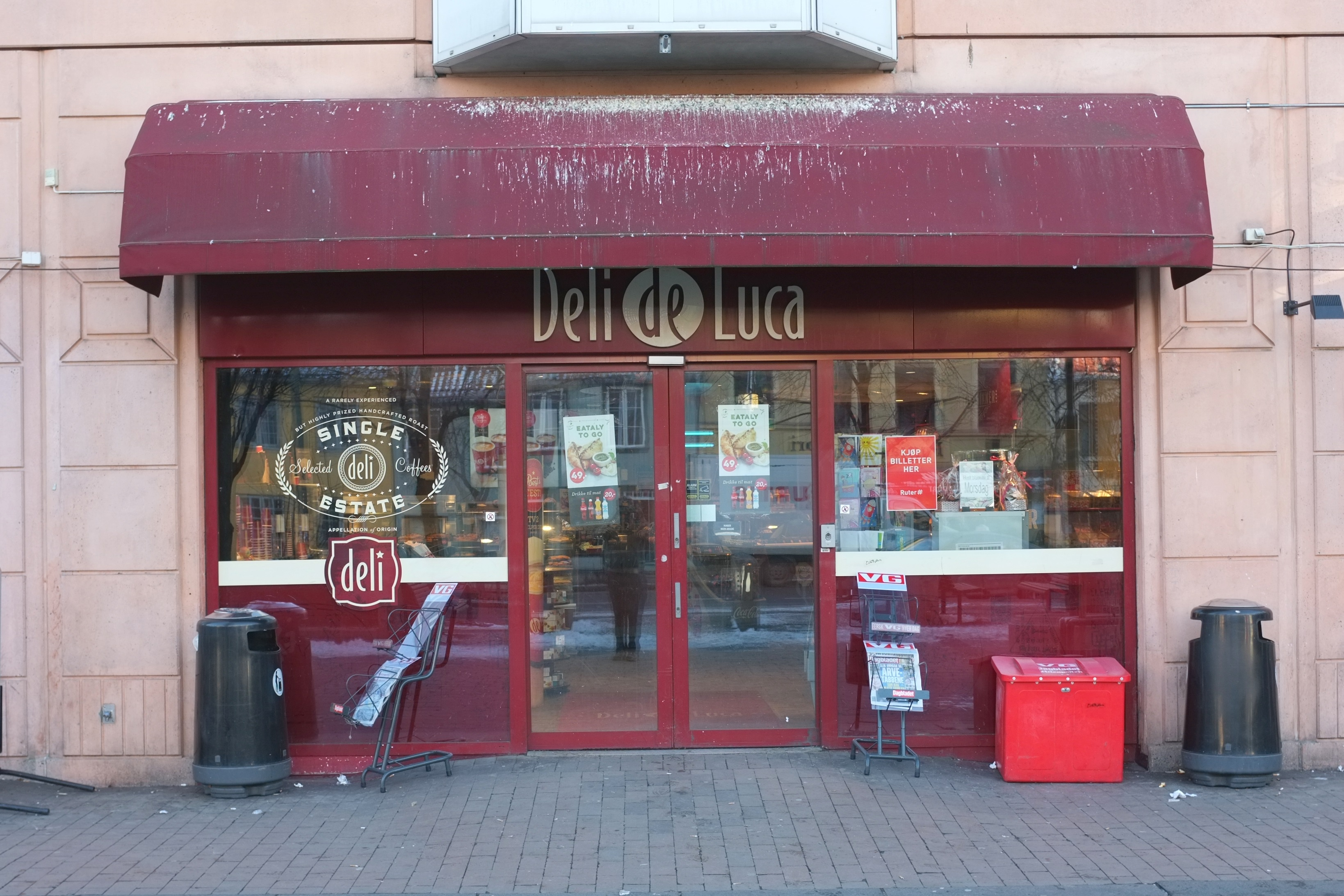 Deli de Luca. Grønland i Oslo.